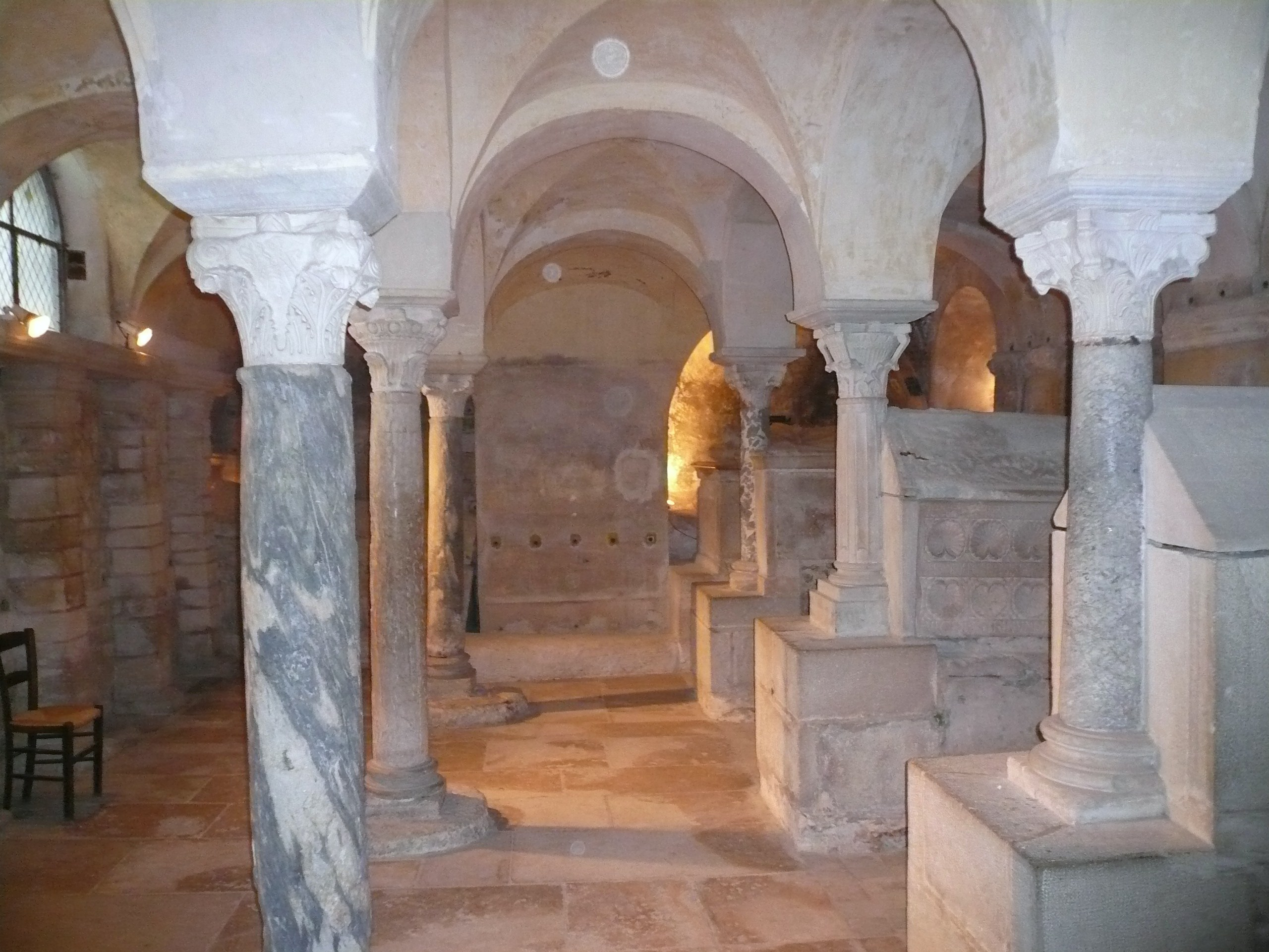 Vue d'ensemble de la partie d'époque mérovingienne (VIIème siècle) de la crypte Saint-Paul de l'abbaye de Jouarre. .